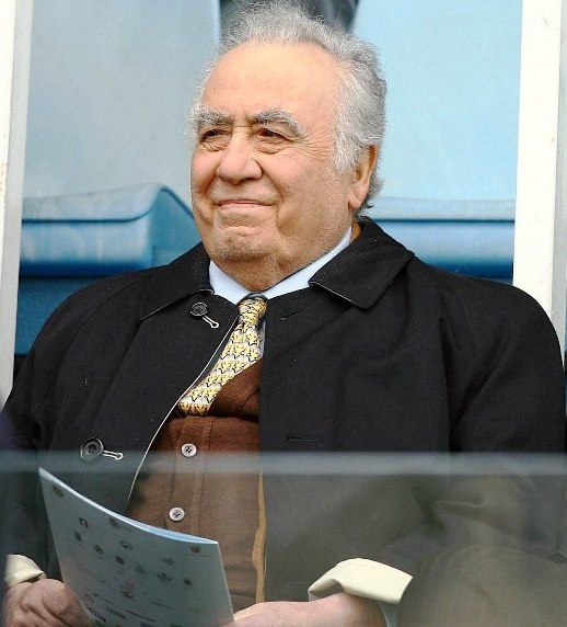 Franco Sensi durante la finale della seconda edizione del Wojtyla Cup